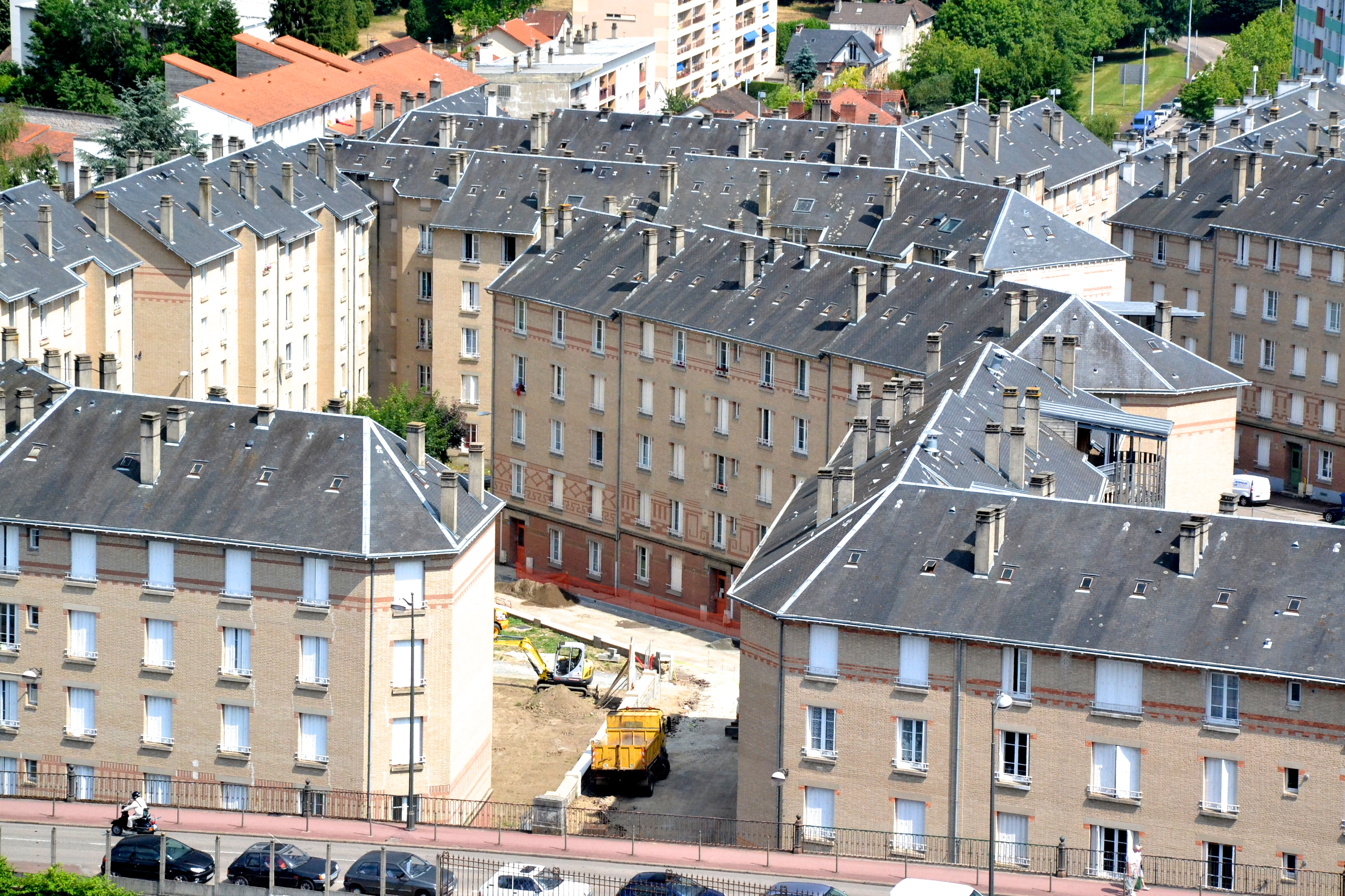 La cité des Coutures vue depuis le campanile de la gare de Limoges.